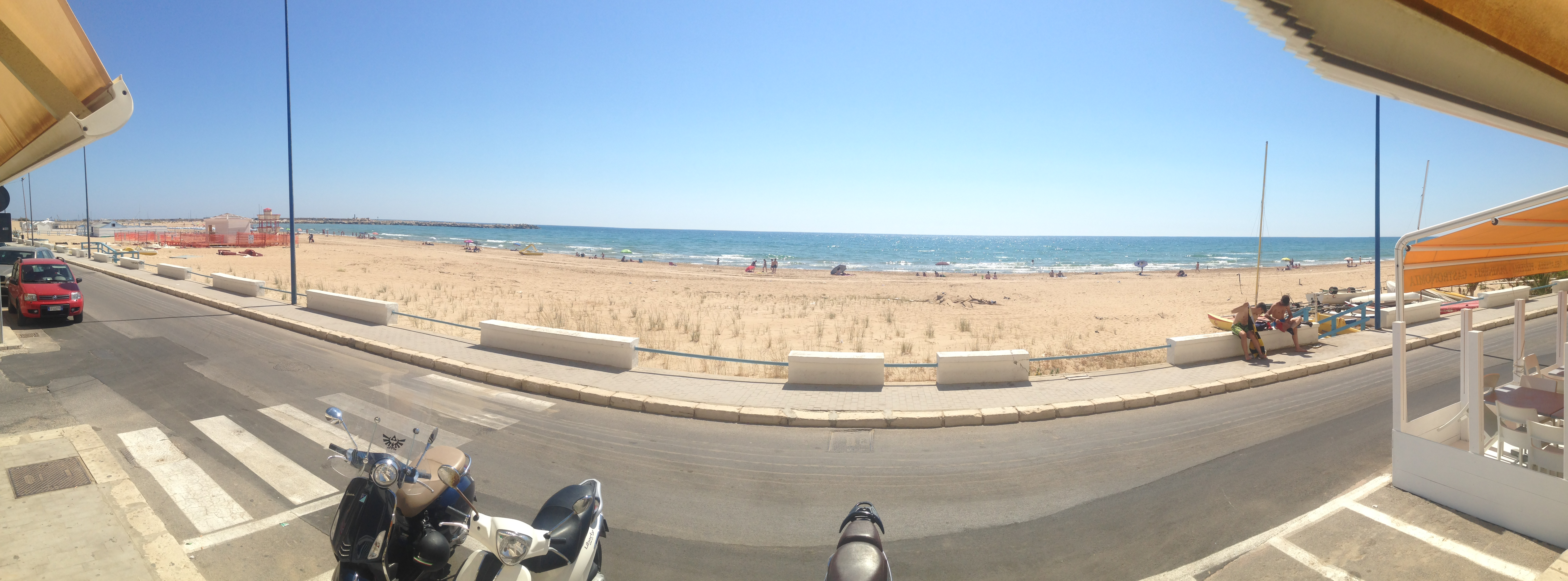 Lungomare di Scoglitti